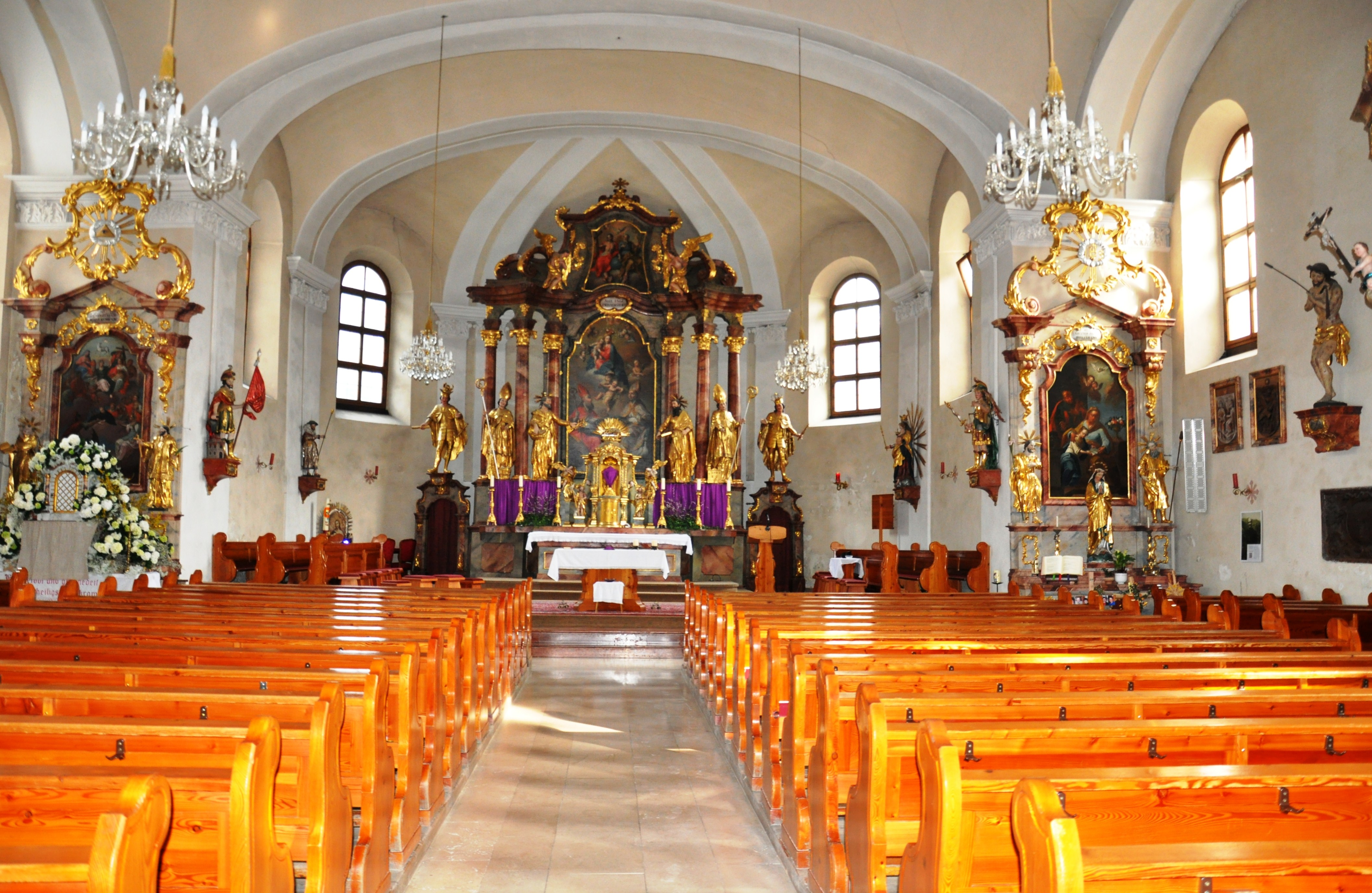 Pfarrkirche Großarl